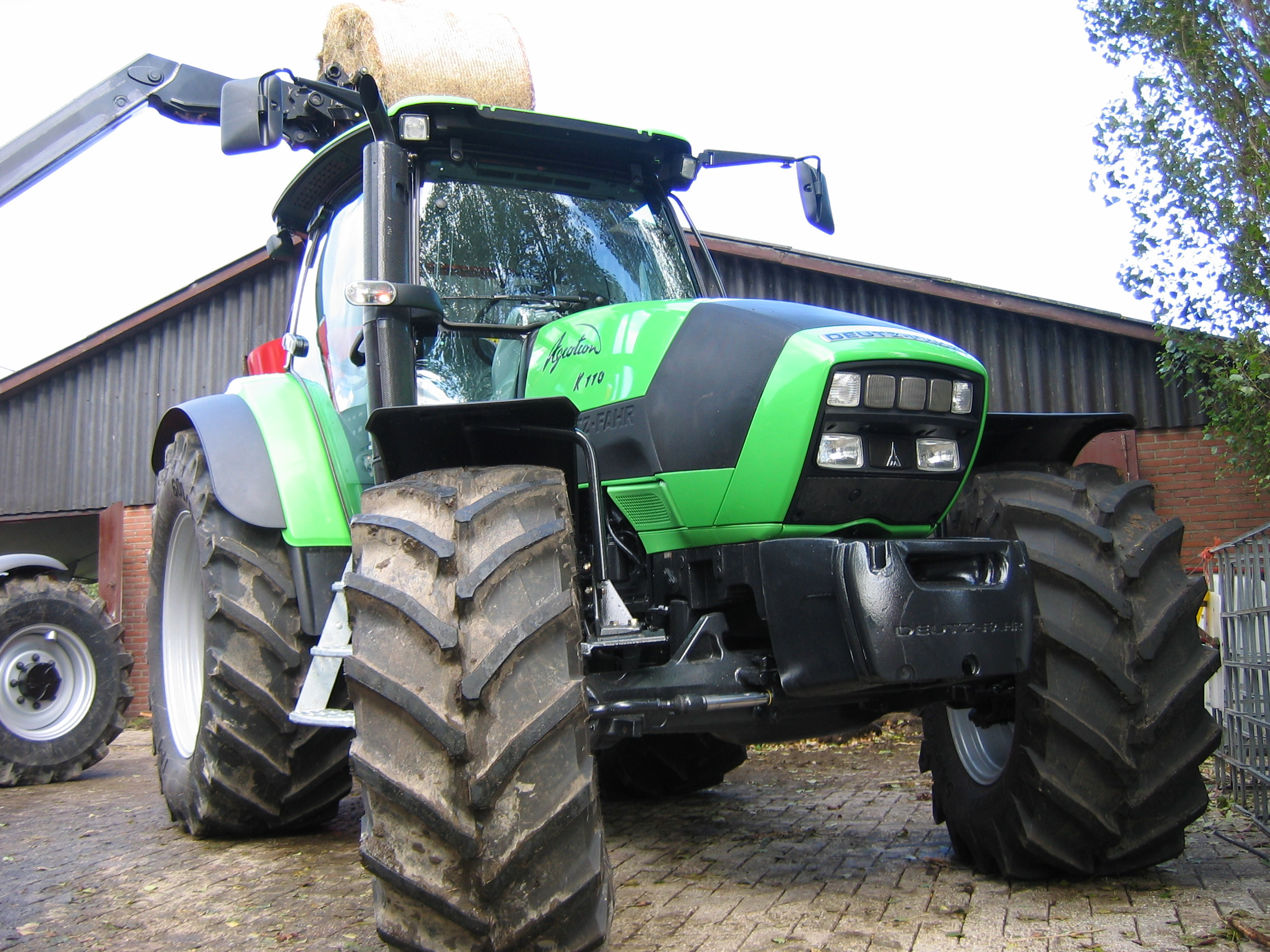 Deutz-Fahr-Traktor vom Typ Agrotron K110